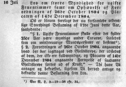 Bilde av lovteksten som fastsetter større myndighet for kvinner i lov av 16. juli 1845.